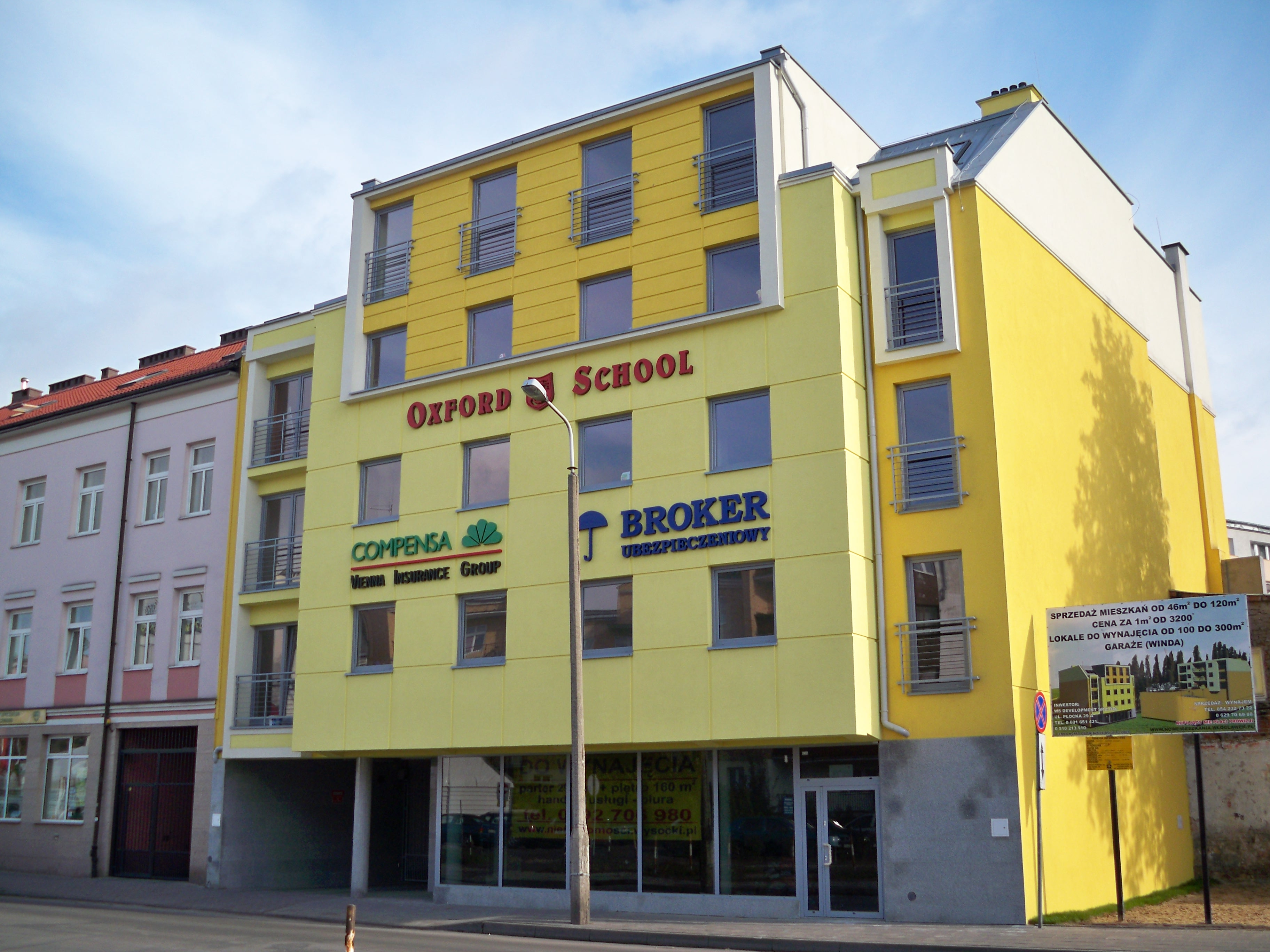 Budowa budynku przy ul. Starodębskiej 1 we Włocławku (2009 r.)